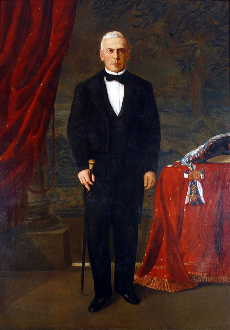 Retrato José Joaquín Pérez Mascayano, Presidente de Chile (1861-1871)